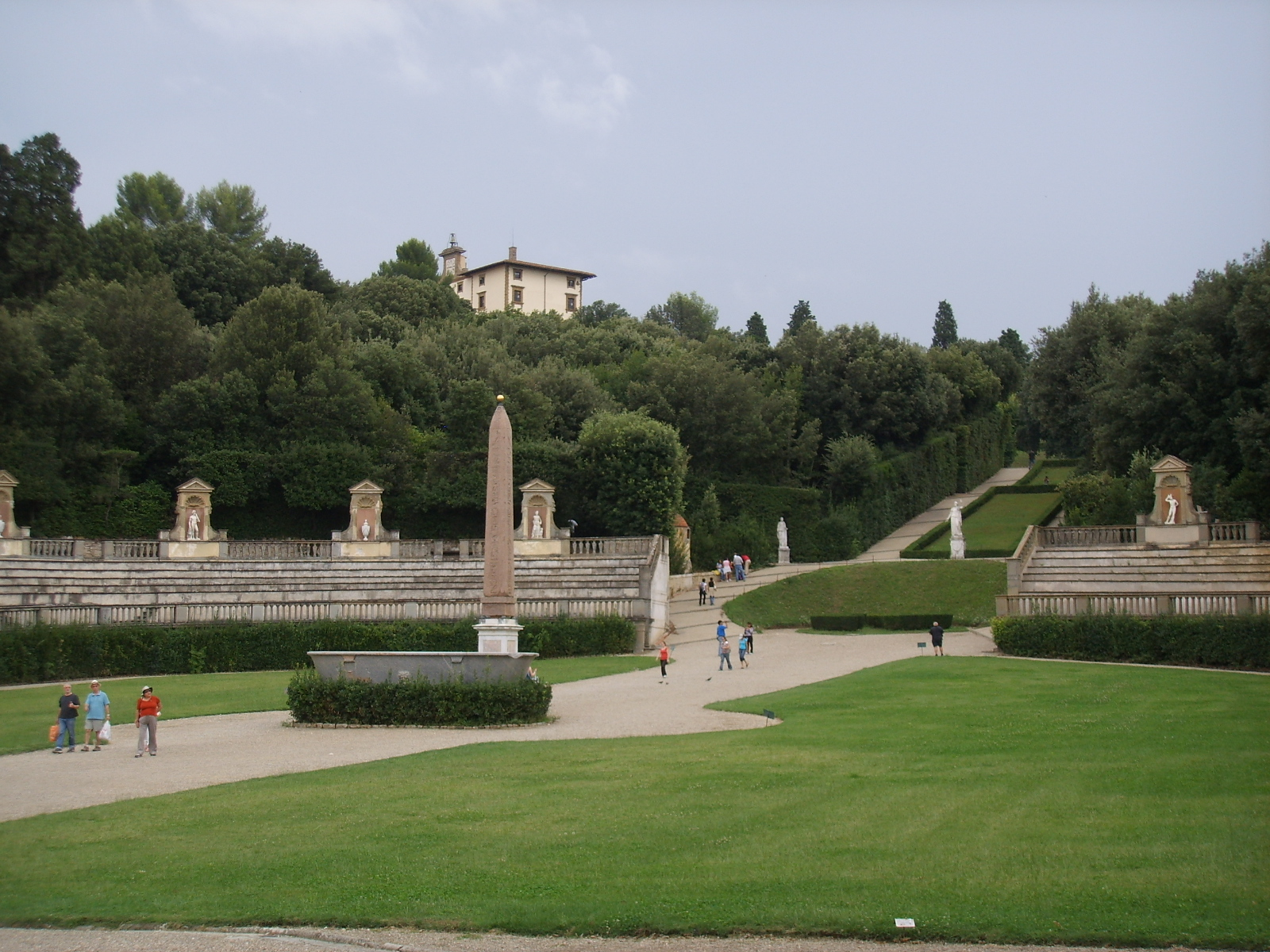 Boboli, anfiteatro 08 e forte belvedere